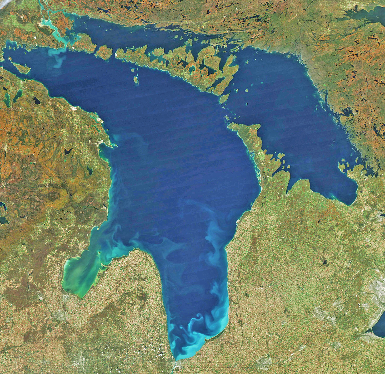 El Lago Hurón en una image de satélite de la NASA tomada en 2011.